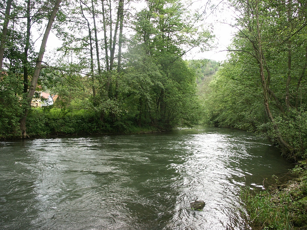 The river Tauber near Waldenhausen (Wertheim), Germany